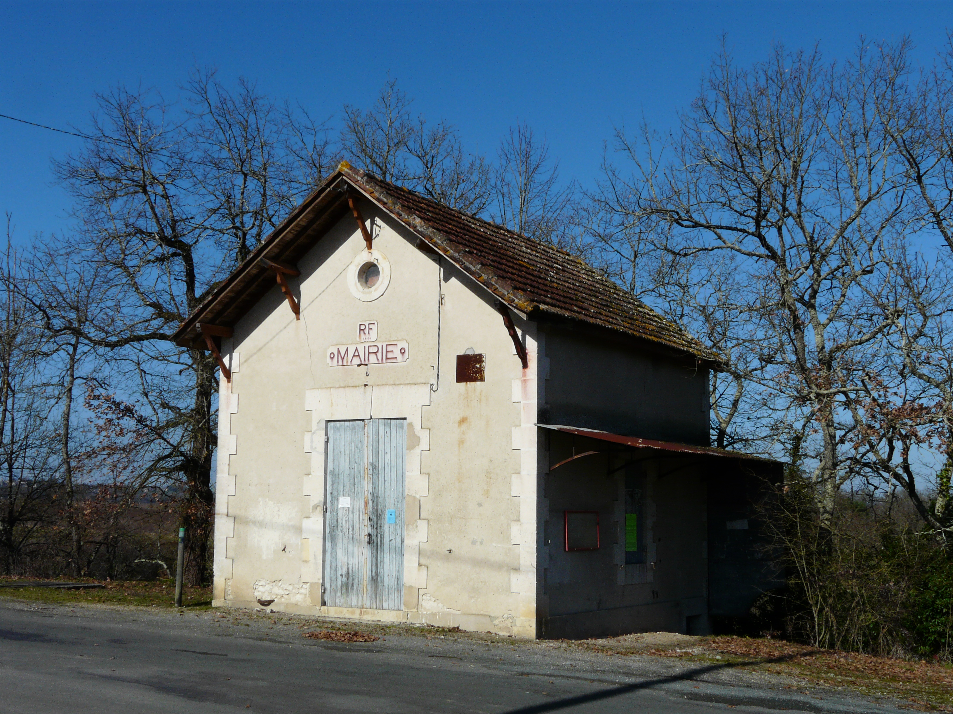 L'ancienne mairie de Cogulot, Eymet, Dordogne, France.